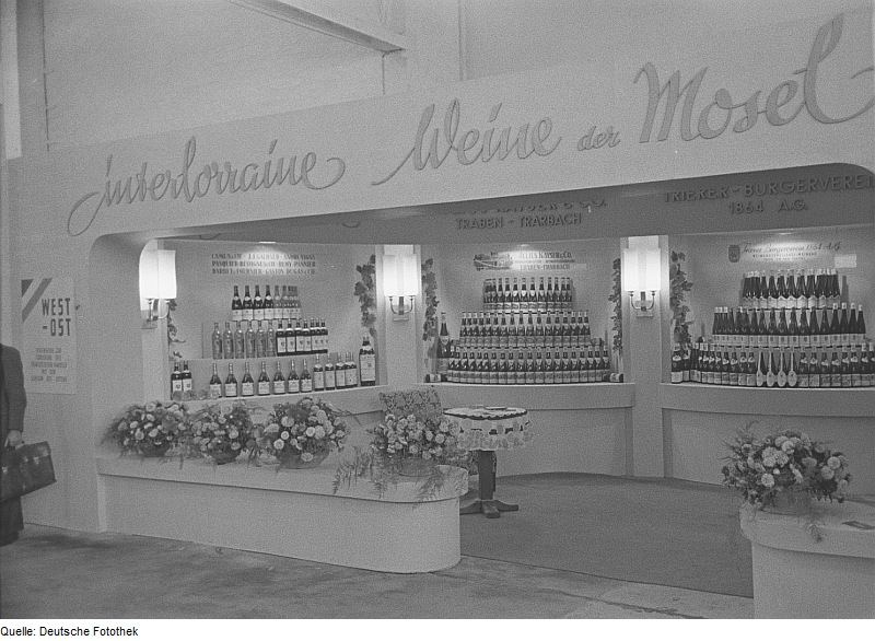 Original image description from the Deutsche Fotothek Messestand mit Weinen von der Mosel